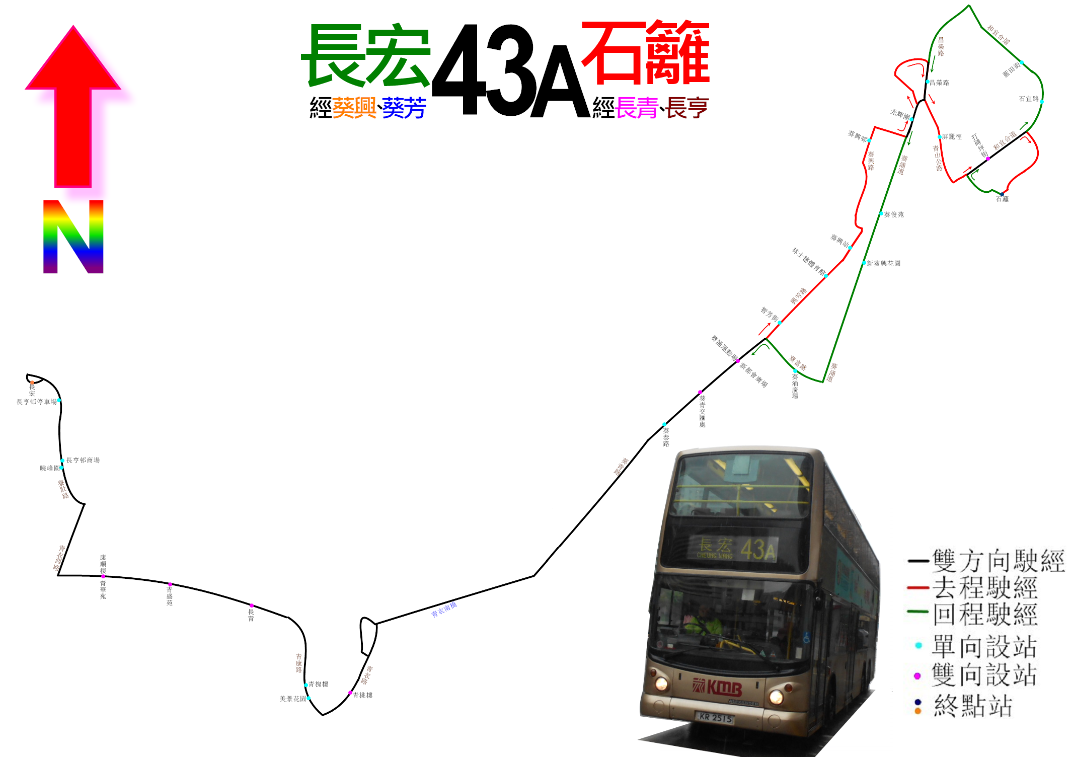 中文（香港）: 九巴43A線的走線圖